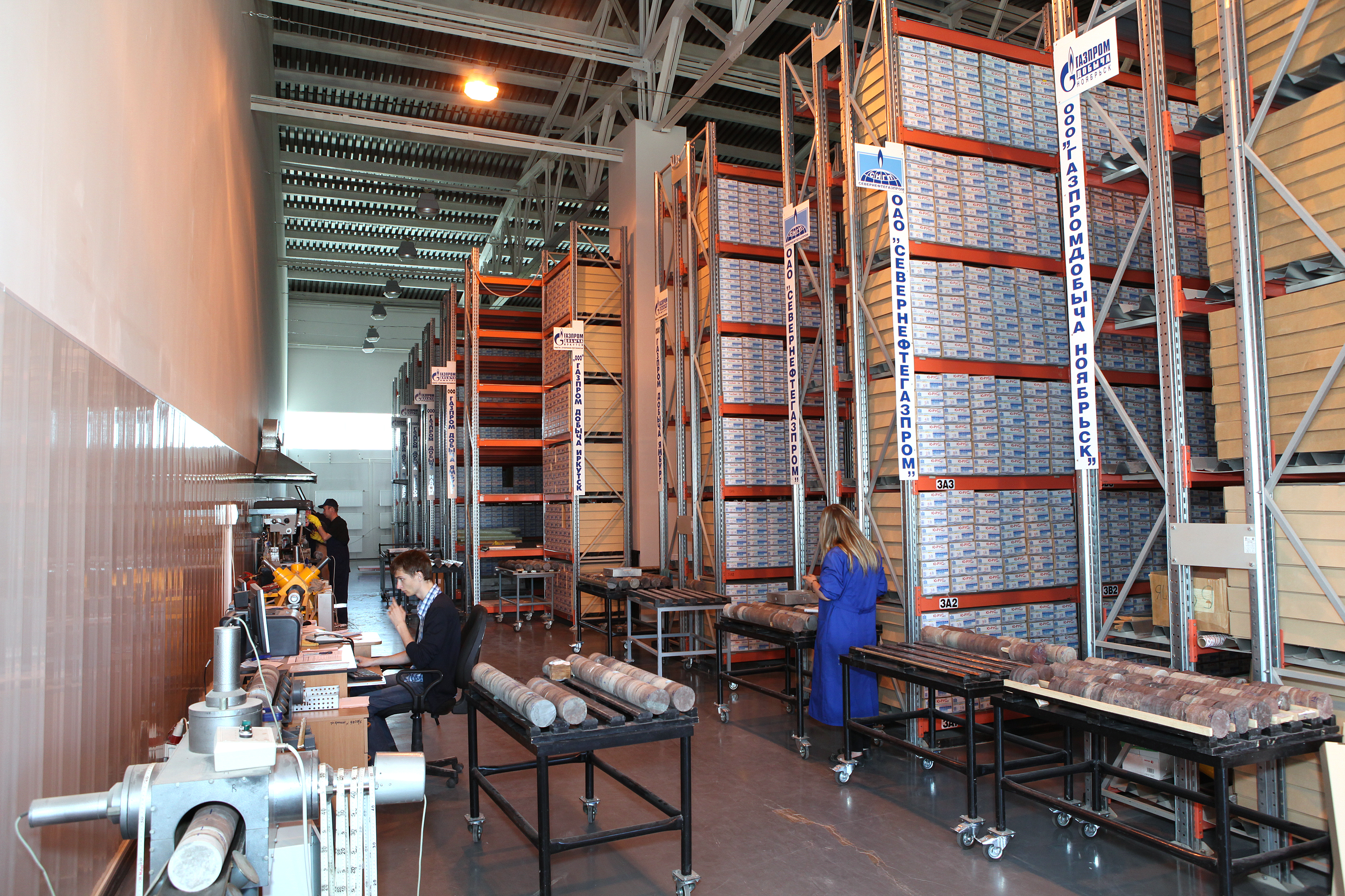 En la Deponejo de geologiaj ekzemploj de TjumenNIIgiprogazo. Tjumeno. La 7-a de julio 2011.